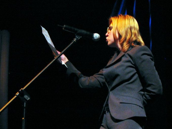 Marta Podgórnik, Polish poet